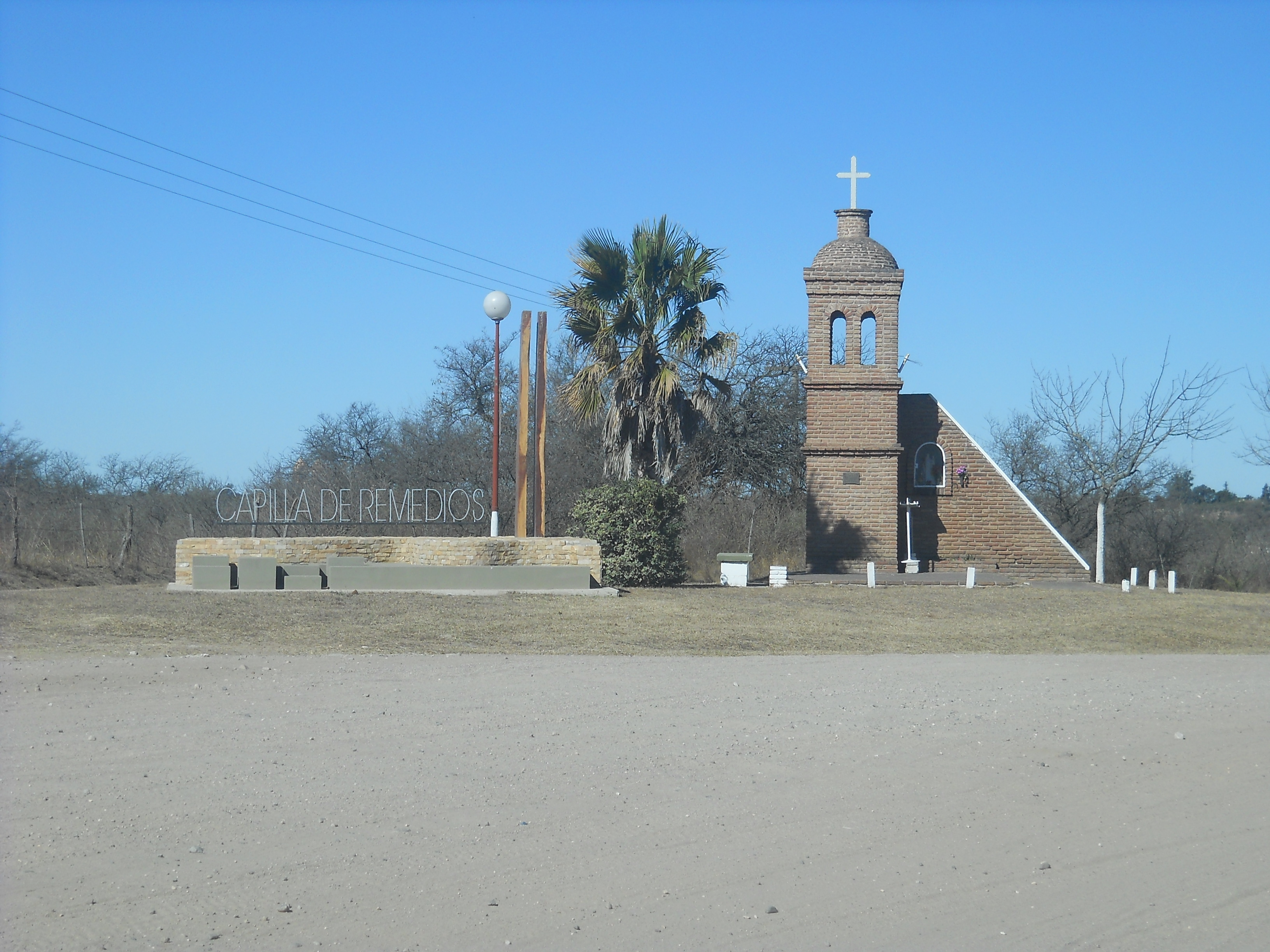 Ingreso a Capilla de Los Remedios